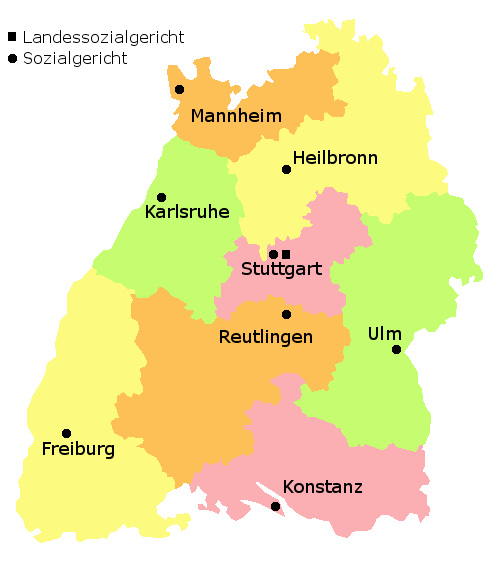 Gerichtsbezirke der Sozialgerichtsbarkeit in Baden-Württemberg